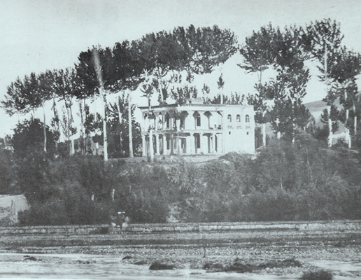 امارت میرزا علی خان سرتیپ در کنار رودخانه اصلی شهر که شهرچای یا برده سور نامیده می شود